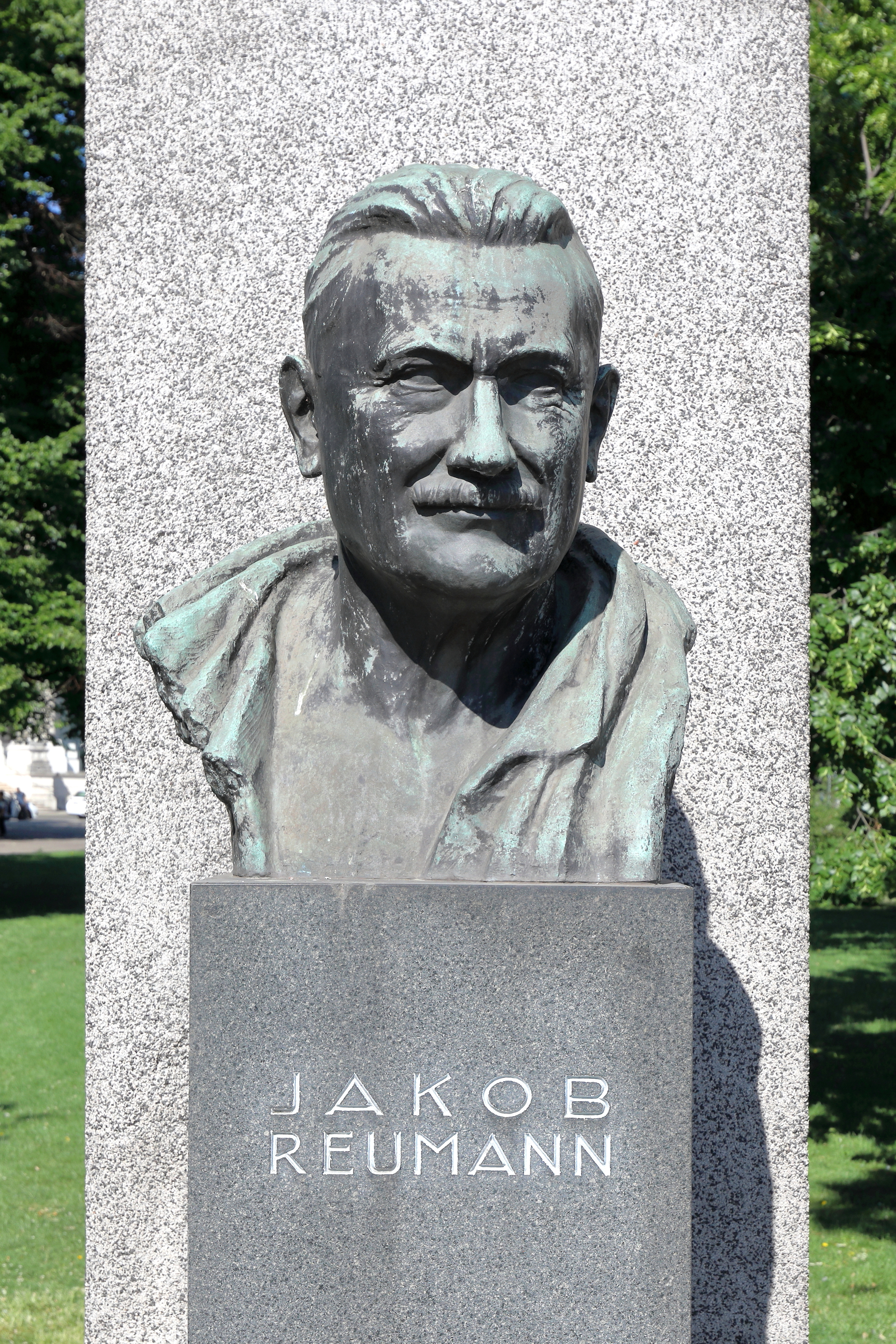 Die Büste Jakob Reumann am Dr.-Karl-Renner-Ring zwischen dem Parlamentsgebäude und Palais Epstein im 1. Wiener Gemeindebezirk Innere Stadt. Die Büste wurde von dem Bildhauer Franz Seifert gefertigt und ist ein Teil des am 12. November 1928 eingeweihten sozialistischen Denkmals der Republik.